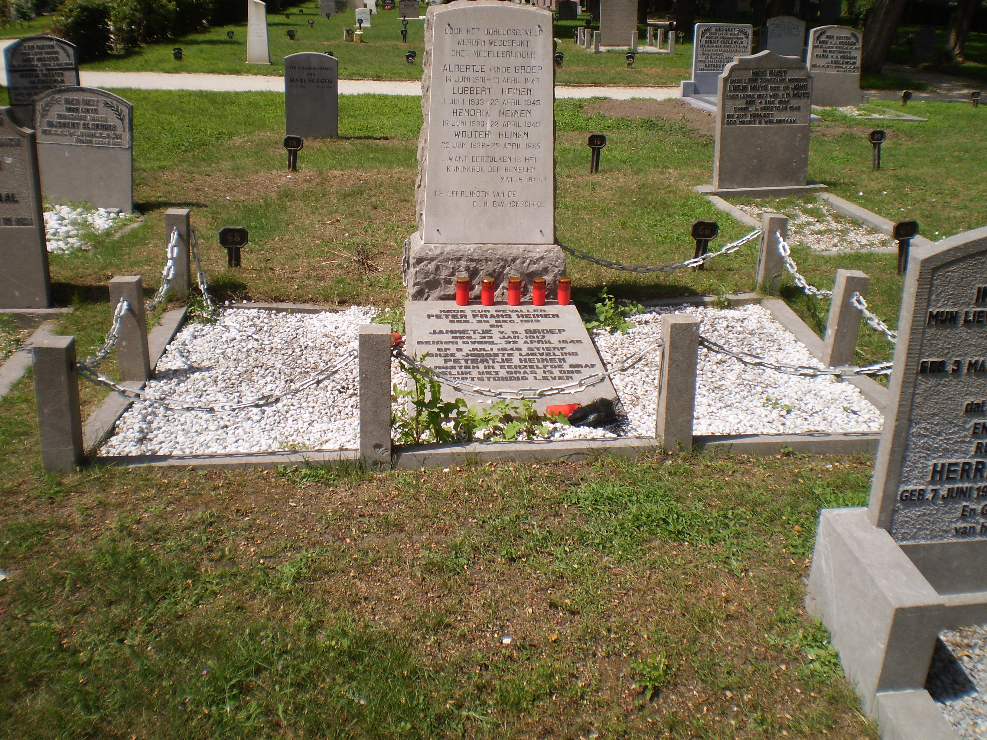 Graf op begraafplaats Memento Mori voor Bunschoters-Spakenburgers die vielen bij gevechten op 21 en 22 april 1945. Onder hen vier schoolkinderen.